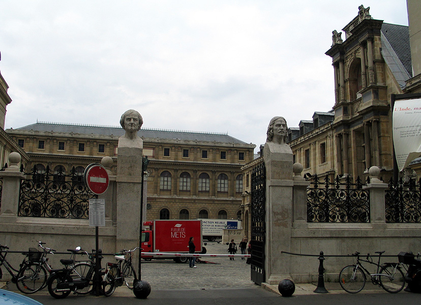 École nationale des Beaux-Arts (National Fine Arts School), Rue Bonaparte entrance, Paris.